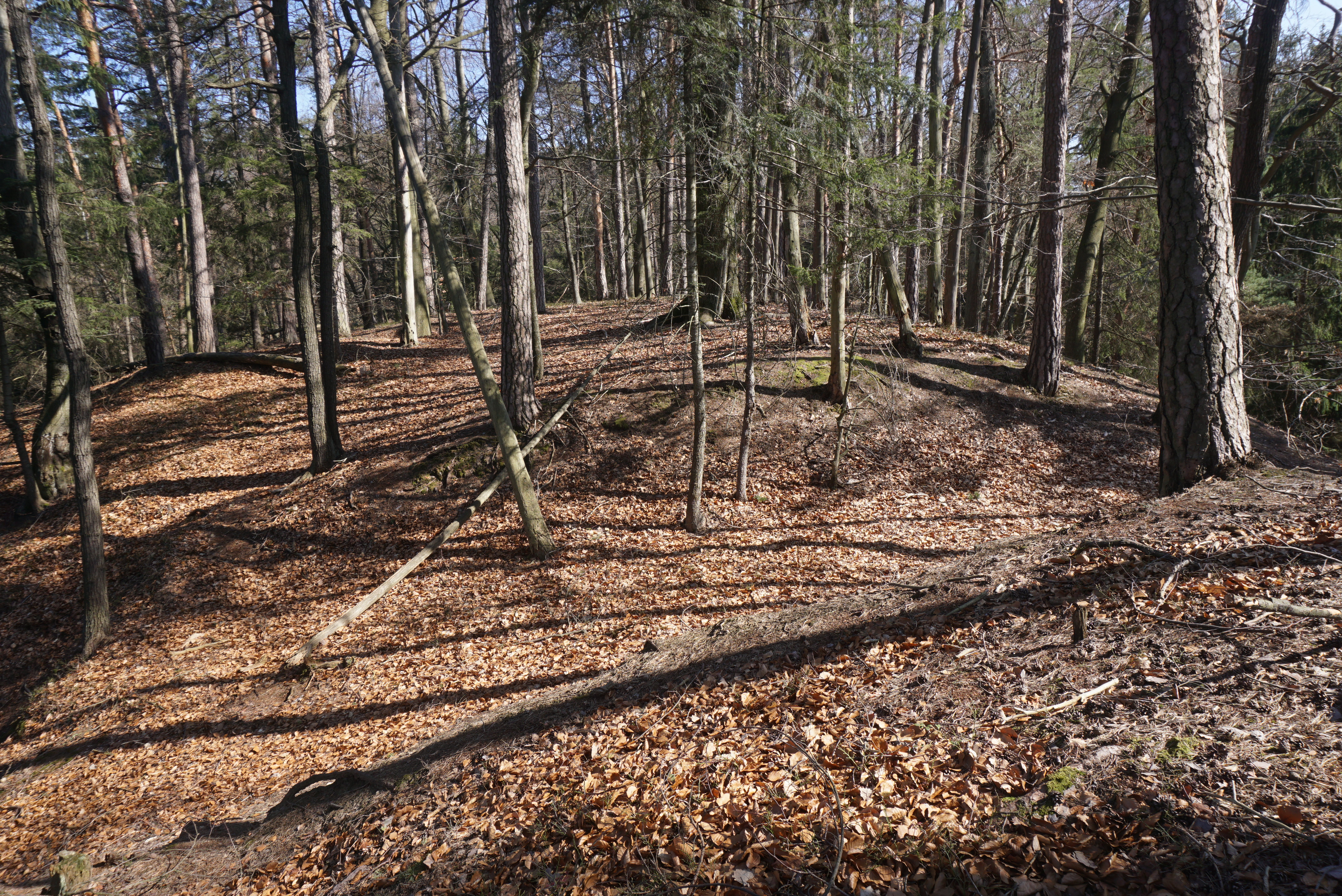 Radeč - skalní hrádek, vnitřní příkop